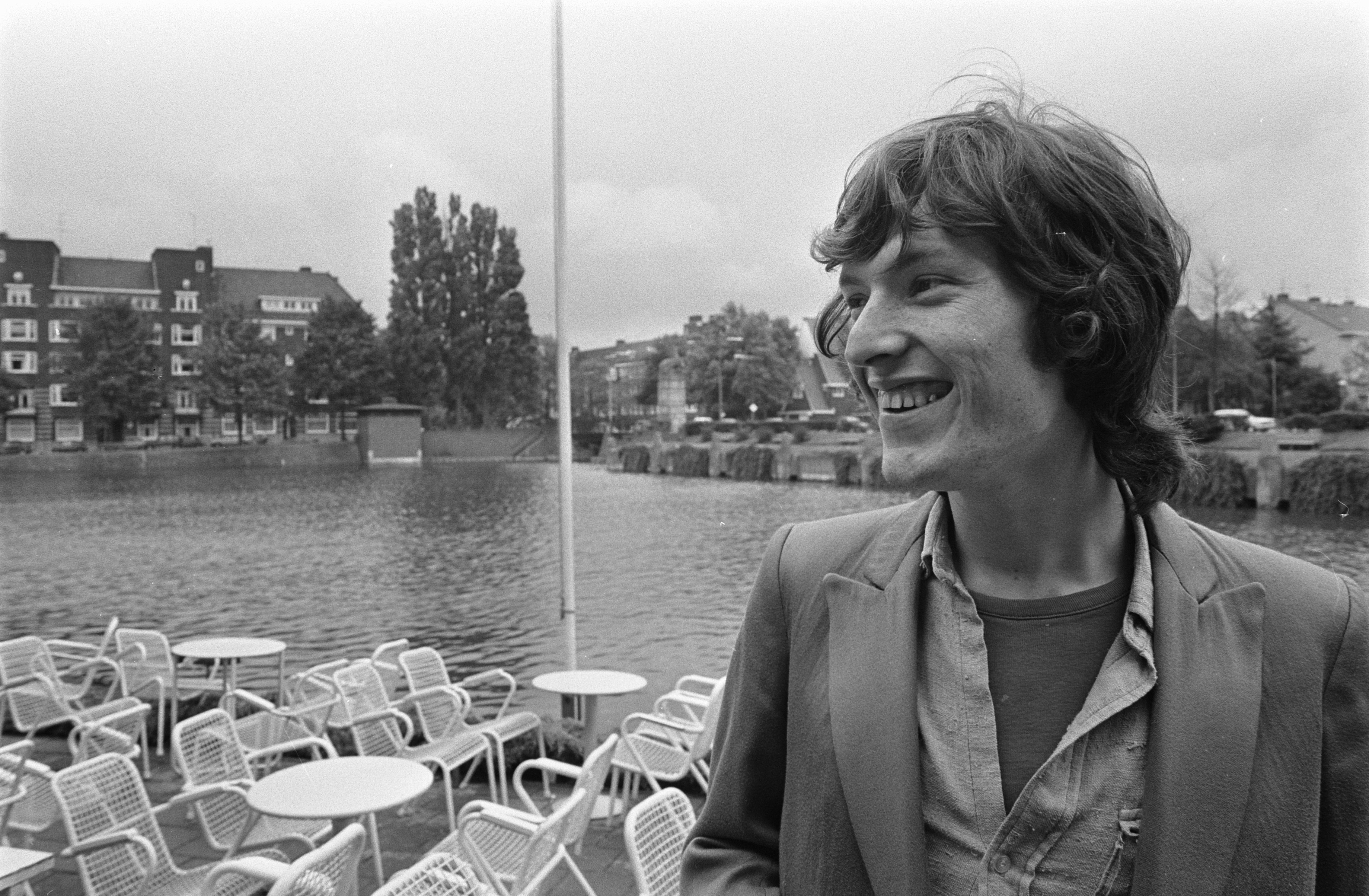 Collectie / Archief : Fotocollectie Anefo Reportage / Serie : [ onbekend ] Beschrijving : Stevie Winwood van beatgroep Traffic en beatgroep Free in Amsterdam; Stevie Winwood , kop Datum : 16 juli 1970 Locatie : Amsterdam, Noord-Holland Trefwoorden : beatgroepen Persoonsnaam : Winwood, Stevie Instellingsnaam : Traffic Fotograaf : Mieremet, Rob / Anefo Auteursrechthebbende : Nationaal Archief Materiaalsoort : Negatief (zwart/wit) Nummer archiefinventaris : bekijk toegang 2.24.01.05 Bestanddeelnummer : 923-6747